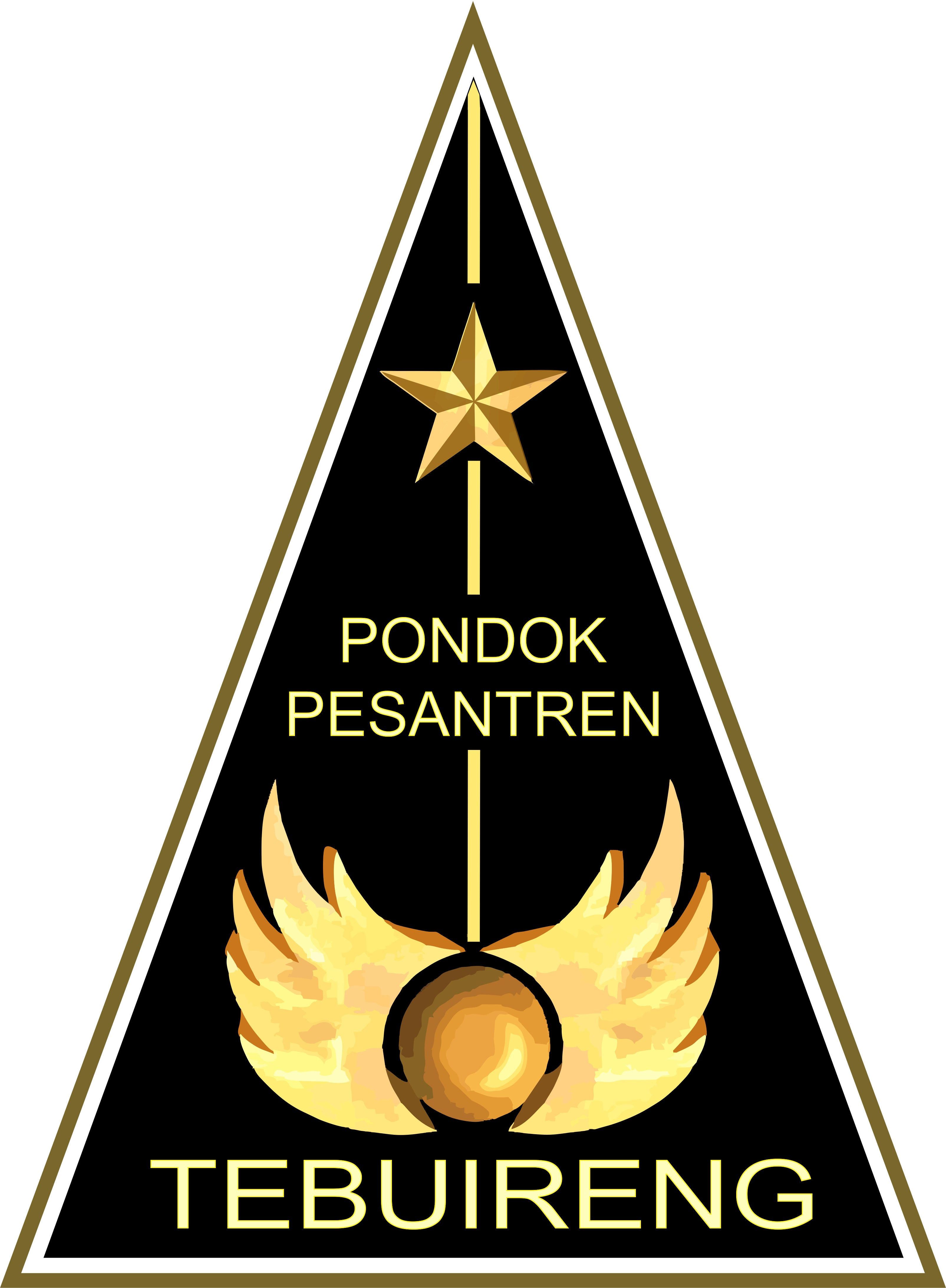 logo tebuireng